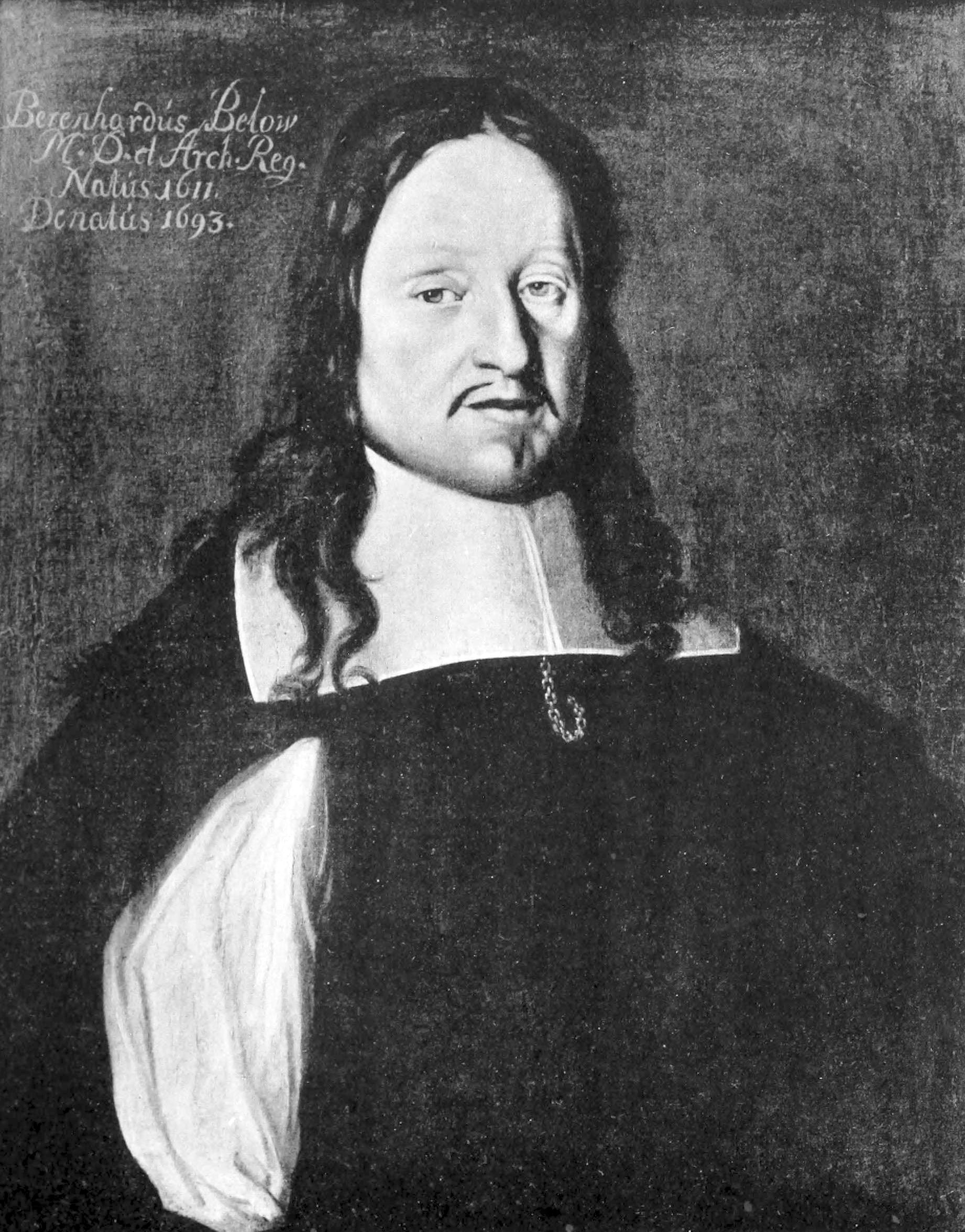 Bernhard Below (1611-1692). Medelålders man, bröstbild, fas t. v., med blå ögon, mörkbrunt hår benadt i midten och kammadt i lockar öfver axlarna, liten kullrig svart kalott, små svarta underrakade halfmånformigt nedsvängda mustascher. Stor hvit fyrkantig nedliggande krage, svart dräkt med ärmarna uppskurna i innersömmen, guldkedja nedhängande under kragen med ena ändan stucken innanför rocken. Mörk bakgrund. Uppe t. h. står: Berenhardus Below M. D. et Arch. Reg. Natus 1611. Denatus 1693.